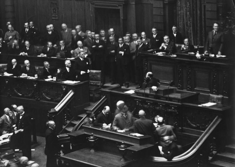 Berlin, Reichstagssitzung Der kritische Moment in der Reichstagssitzung vom 12.09.1932: der Kanzler meldet sich zum Wort [Berlin.- Reichstagsssitzung vor Auflösung des Reichstag am 12.9.1932.- Franz von Papen (stehend links), Hermann Göring (oben rechts, stehend)] Abgebildete Personen: Neurath, Konstantin von Freiherr: Außenminister, Reichsprotektor für Böhmen und Mähren, Deutsches Reich (GND 118786016) Göring, Hermann: Reichsmarschall, Oberbefehlshaber der Luftwaffe, Ministerpräsident von Preußen, Deutsches Reich Papen, Franz von: Reichskanzler, Vizekanzler, Botschafter, Deutsches Reich